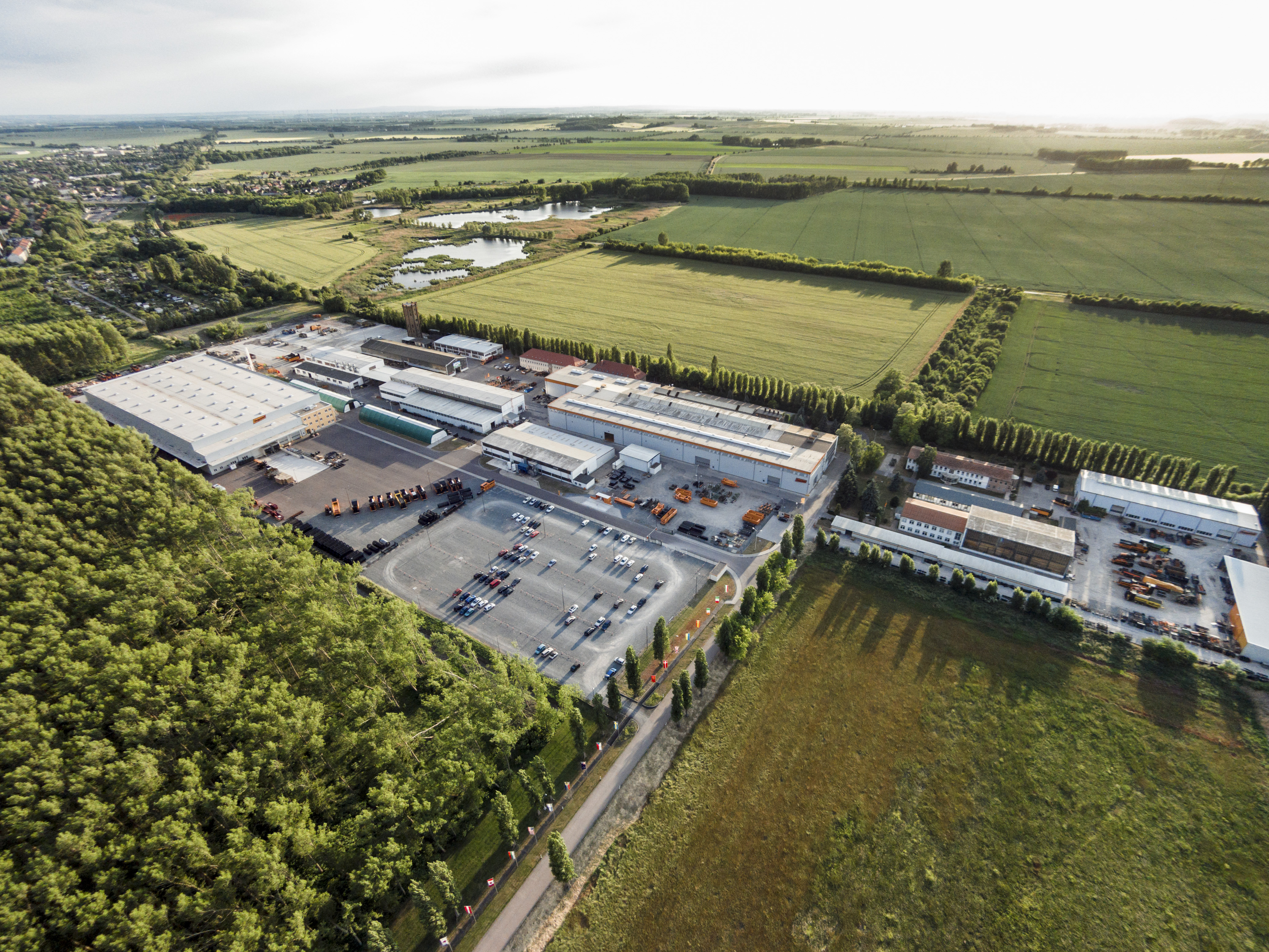 Der größte Standort der Firma Doppstadt befindet sich in Calbe (Sachsen-Anhalt) in der Nähe von Magdeburg. Der Standort Calbe hat eine über 40-jährige Tradition in der Förderband- und Maschinenbautechnologie. Dort werden auf 222.000 m² Fläche mobile Doppstadt Maschinen für die Abfallwirtschaft, Kommunalwirtschaft und Fördertechnik entwickelt, hergestellt und vertrieben.